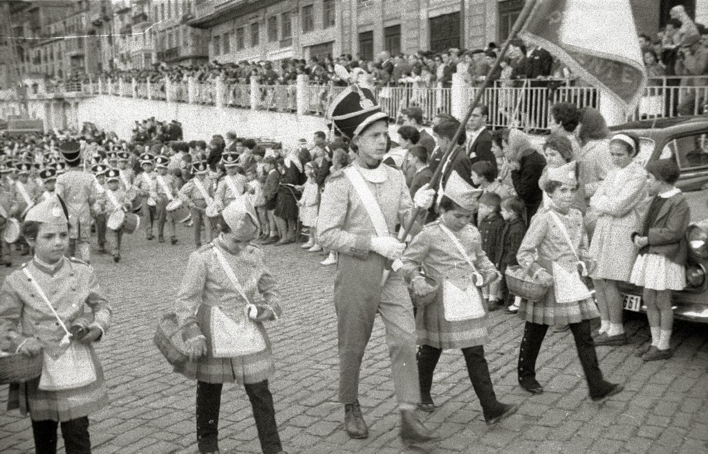 Título original: Tamborrada de San Sebastián (85/93) Localización: San Sebastián (Guipúzcoa)